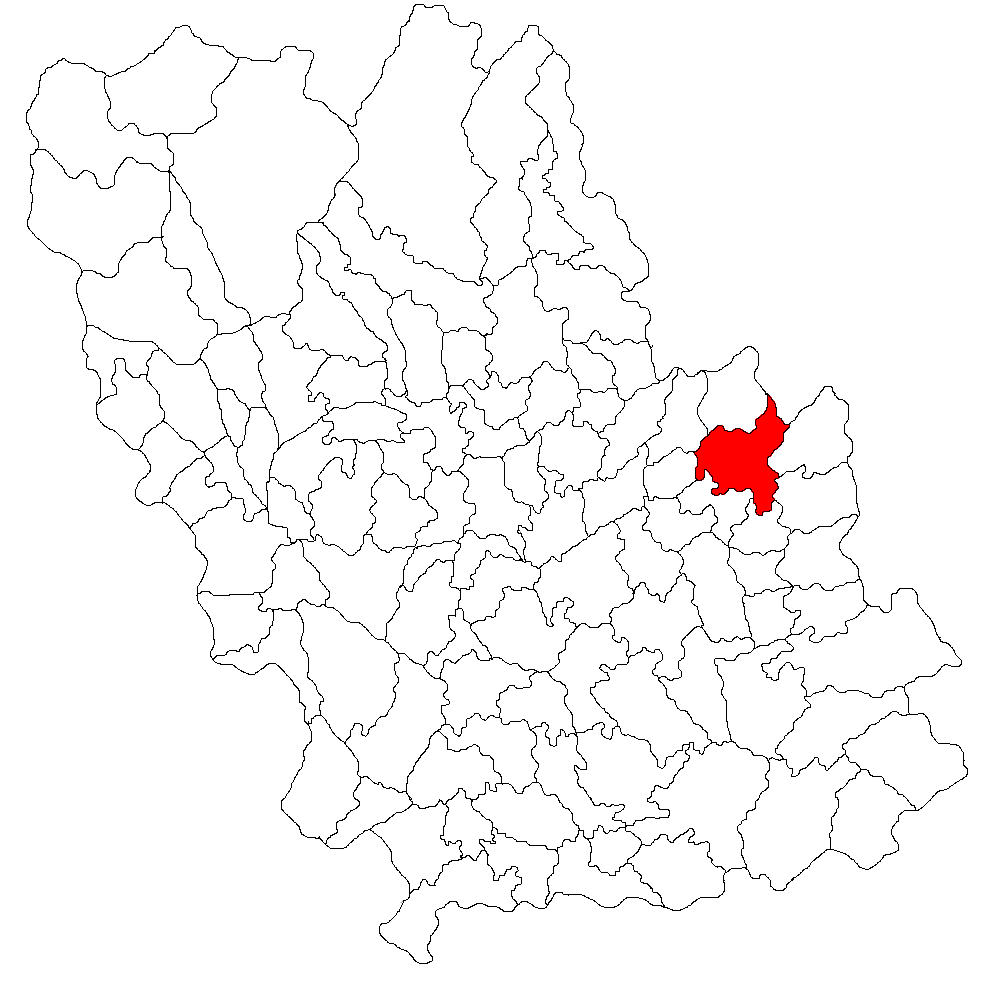 Categorie:Hărţi ale judeţului Prahova